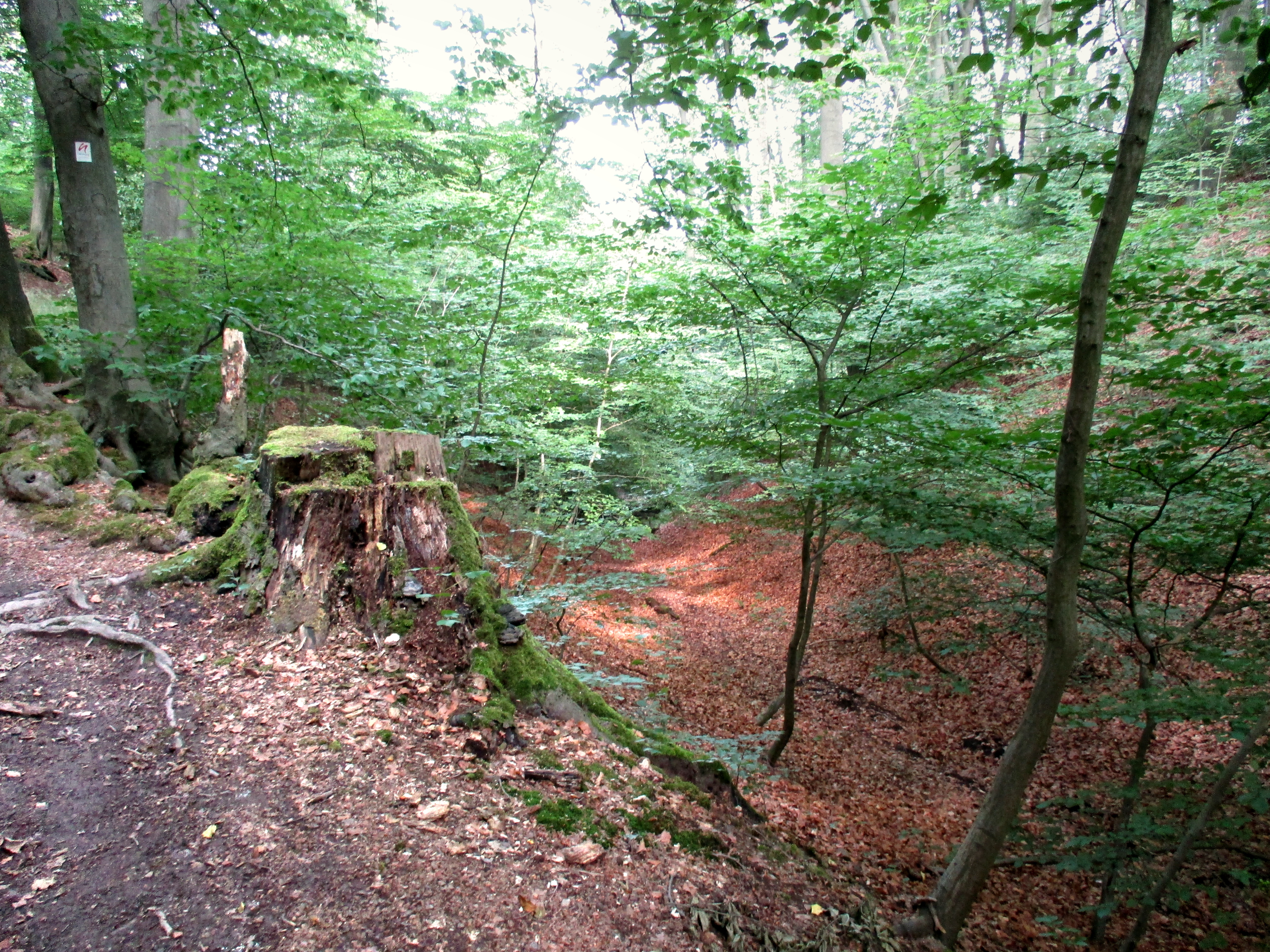 Hardenbergischer Alaunsteinbruch „Alaunloch“. Dort wurde früher Alaunschiefer abgebaut. Er liegt am Hohlweg, einer alten Hauptstraße, welche bereits im Mittelalter die Ortschaften Wallmichrath, Kuhlendahl und Windrath verband.